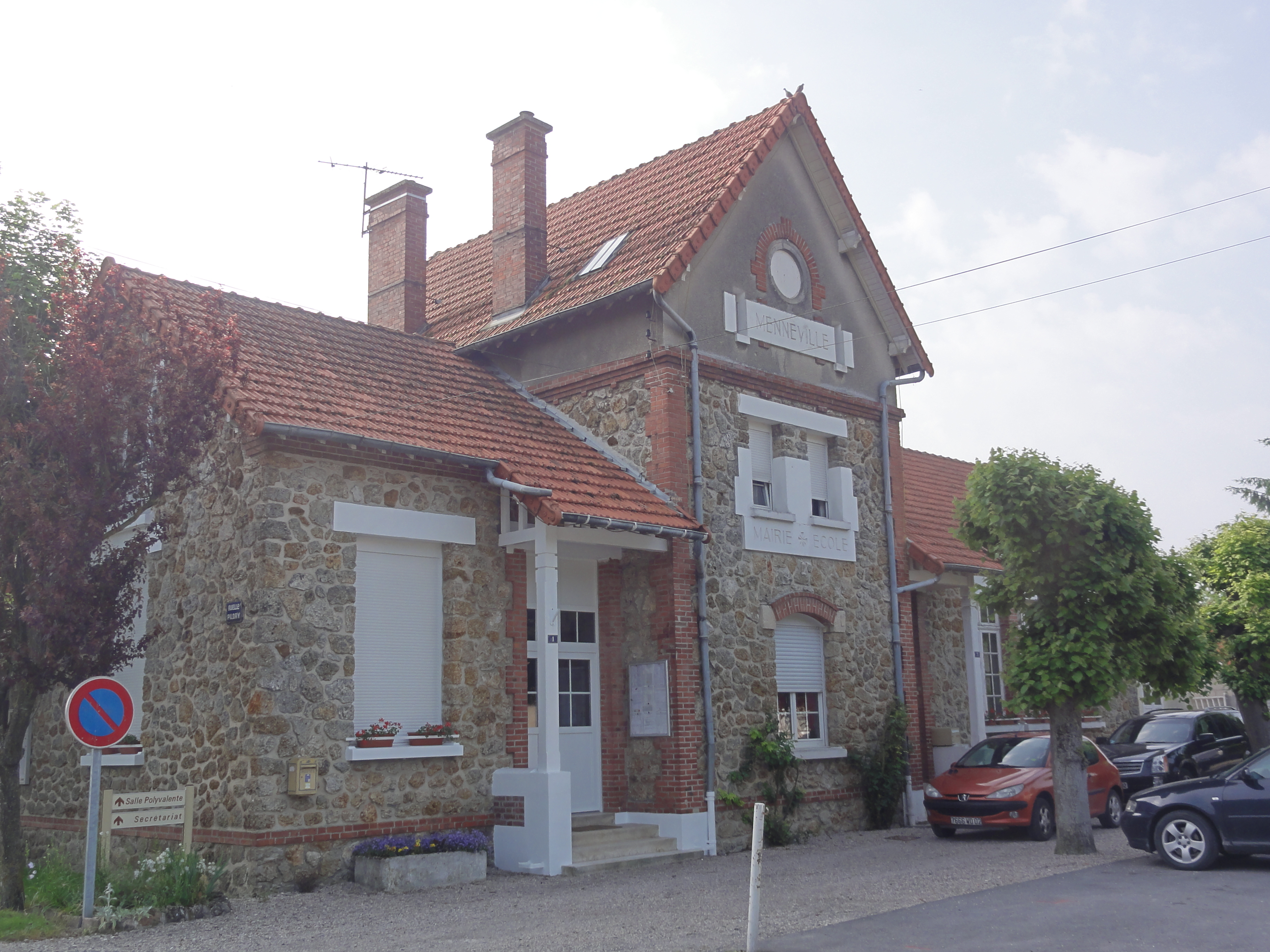 Menneville (Aisne) Mairie